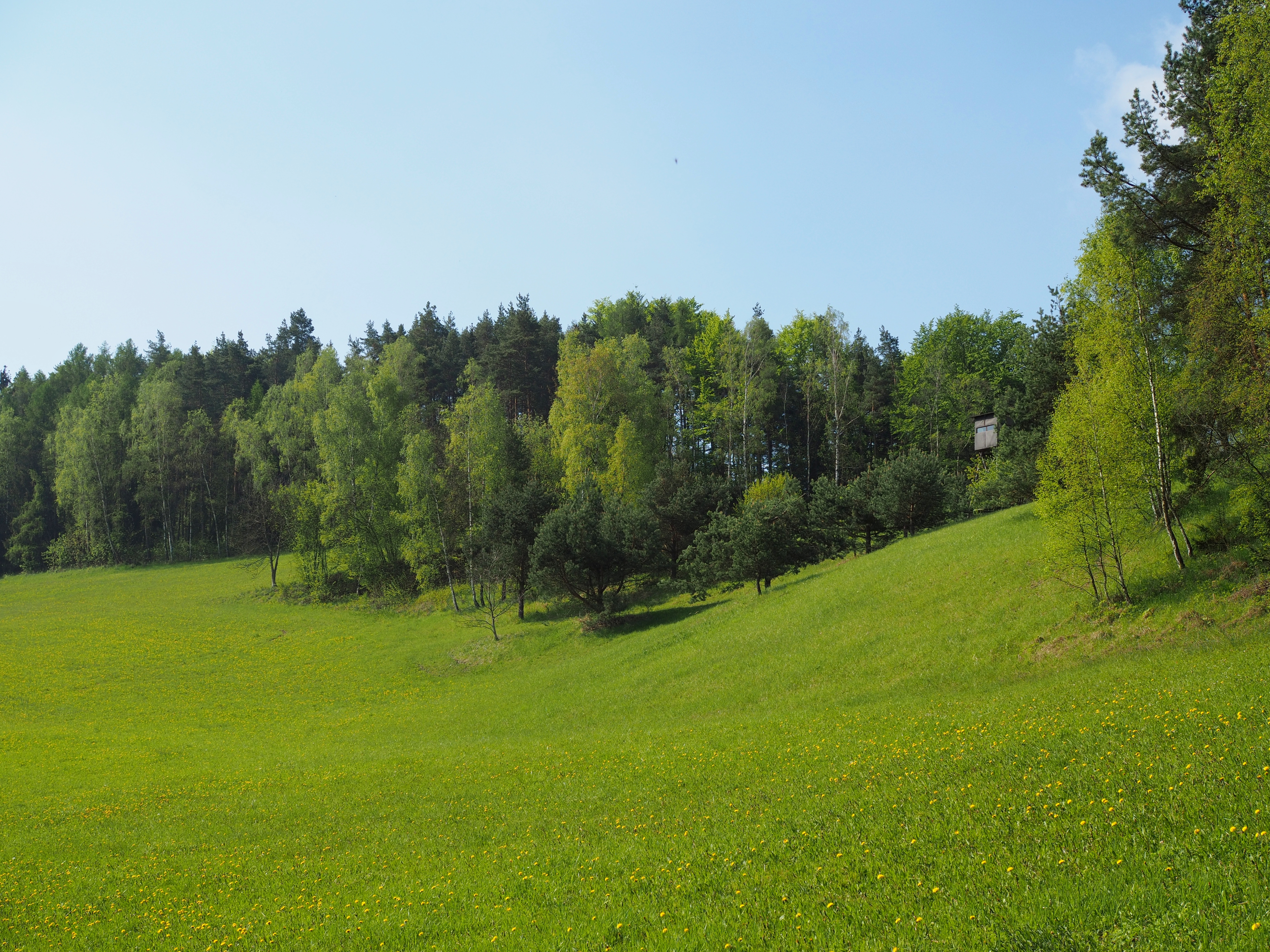 Přírodní památka V Jezdinách (Natural monument V Jezdinách) Project: Chráněná území.